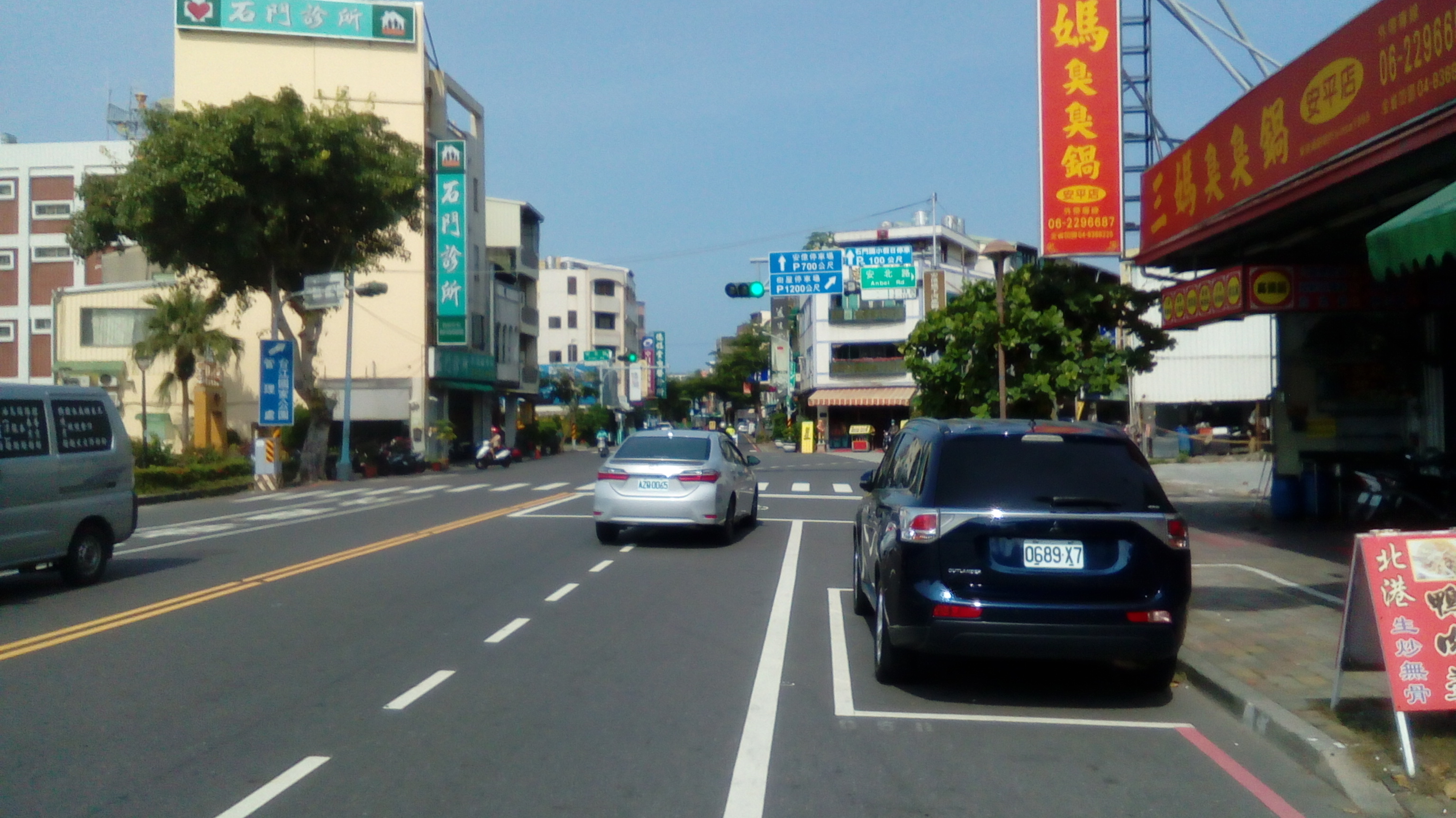 攝於台南運河旁